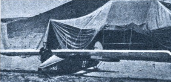 Szybowiec Miś